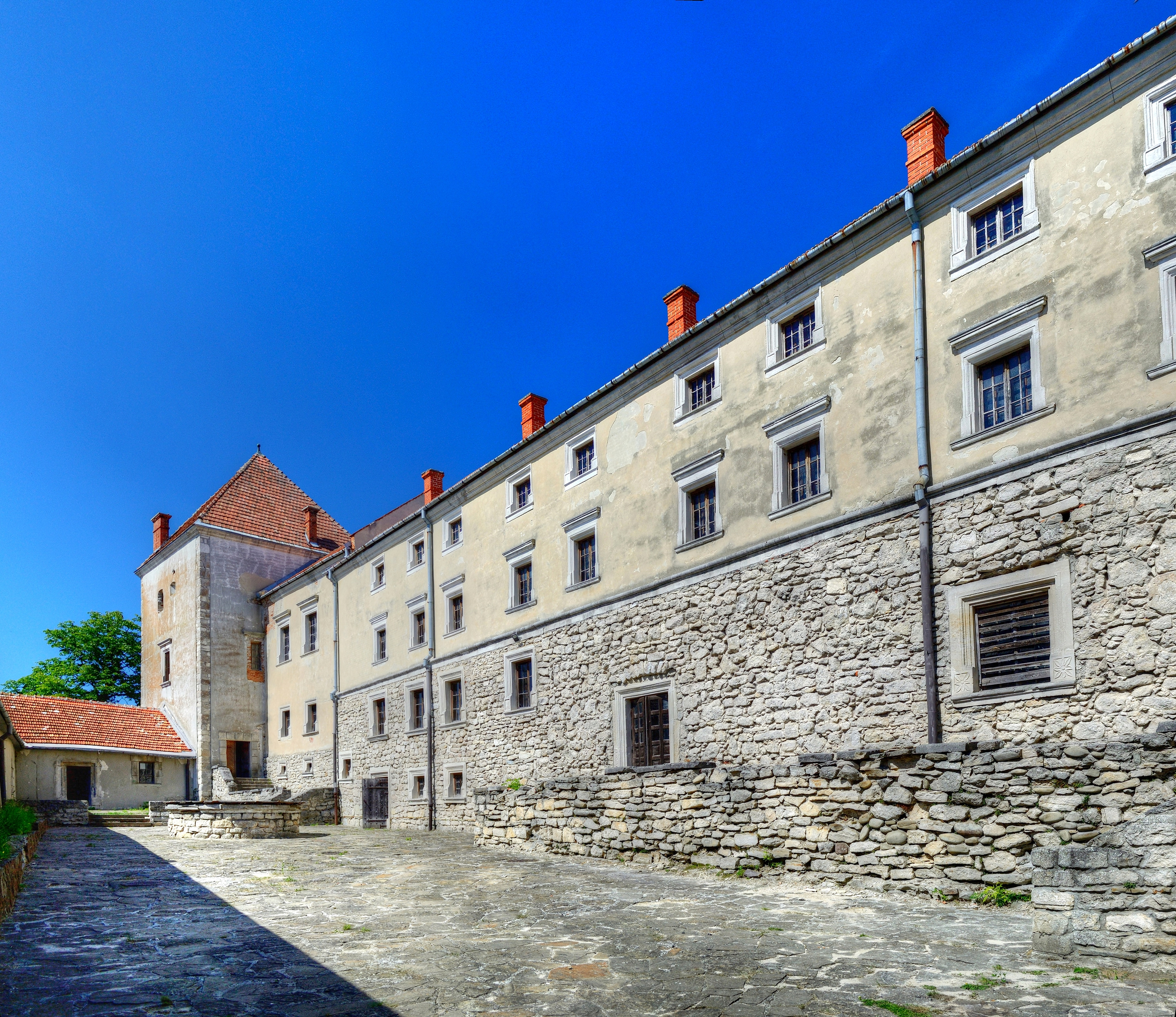 Нижній двір